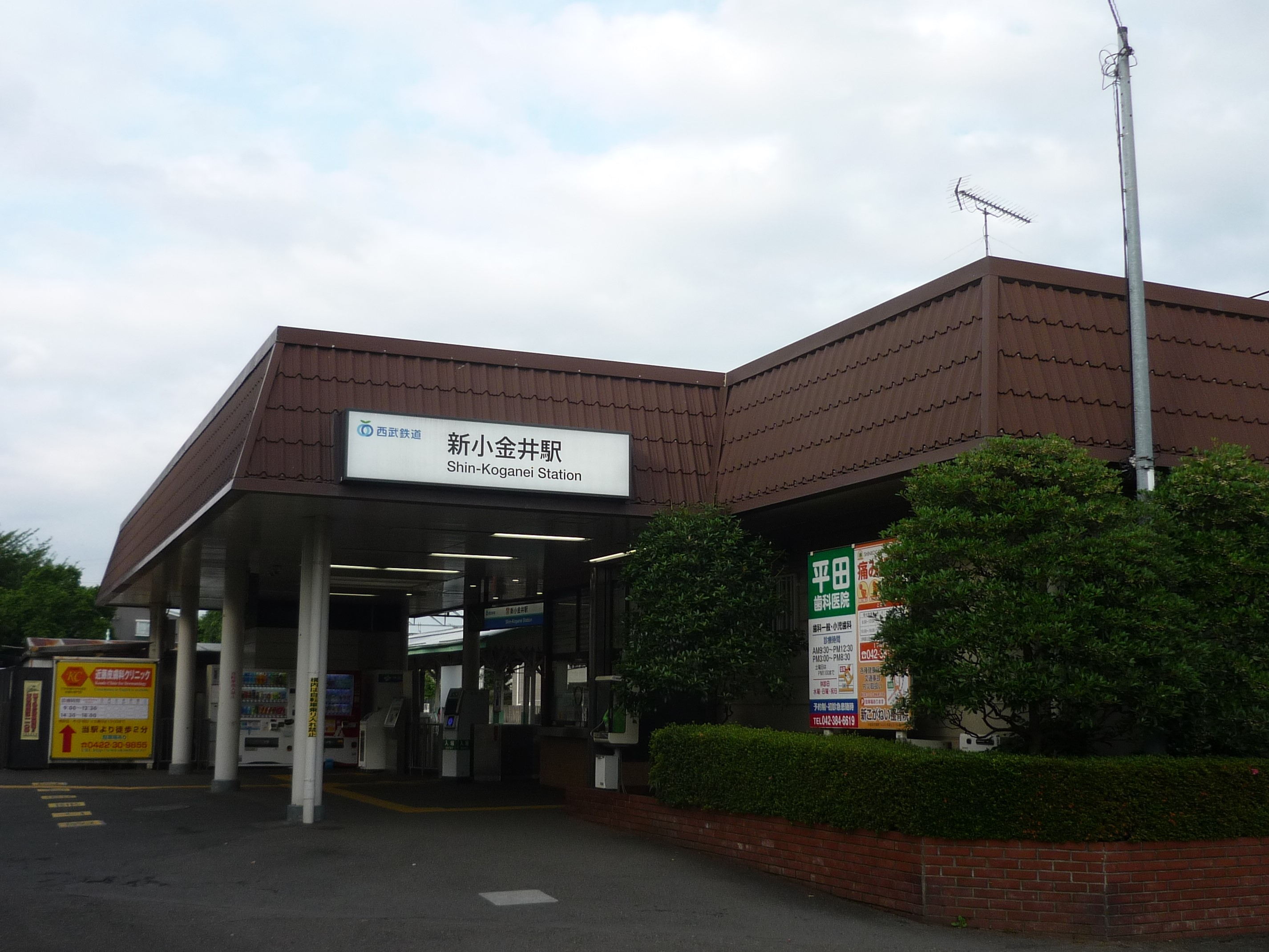 新小金井駅 駅舎